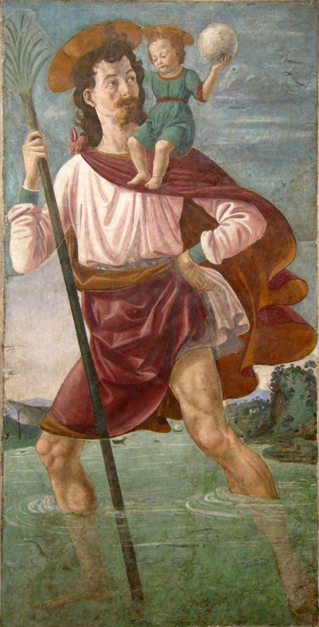 Ghirlandaio, san cristoforo, forse da san miniato fra le torri